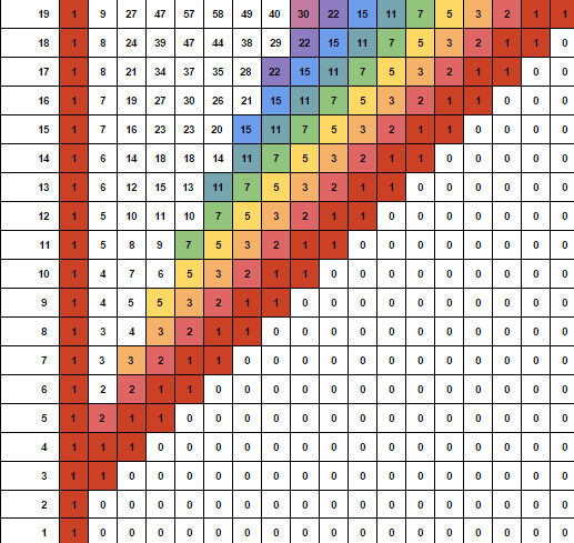 Tabla de Daniel P(n)